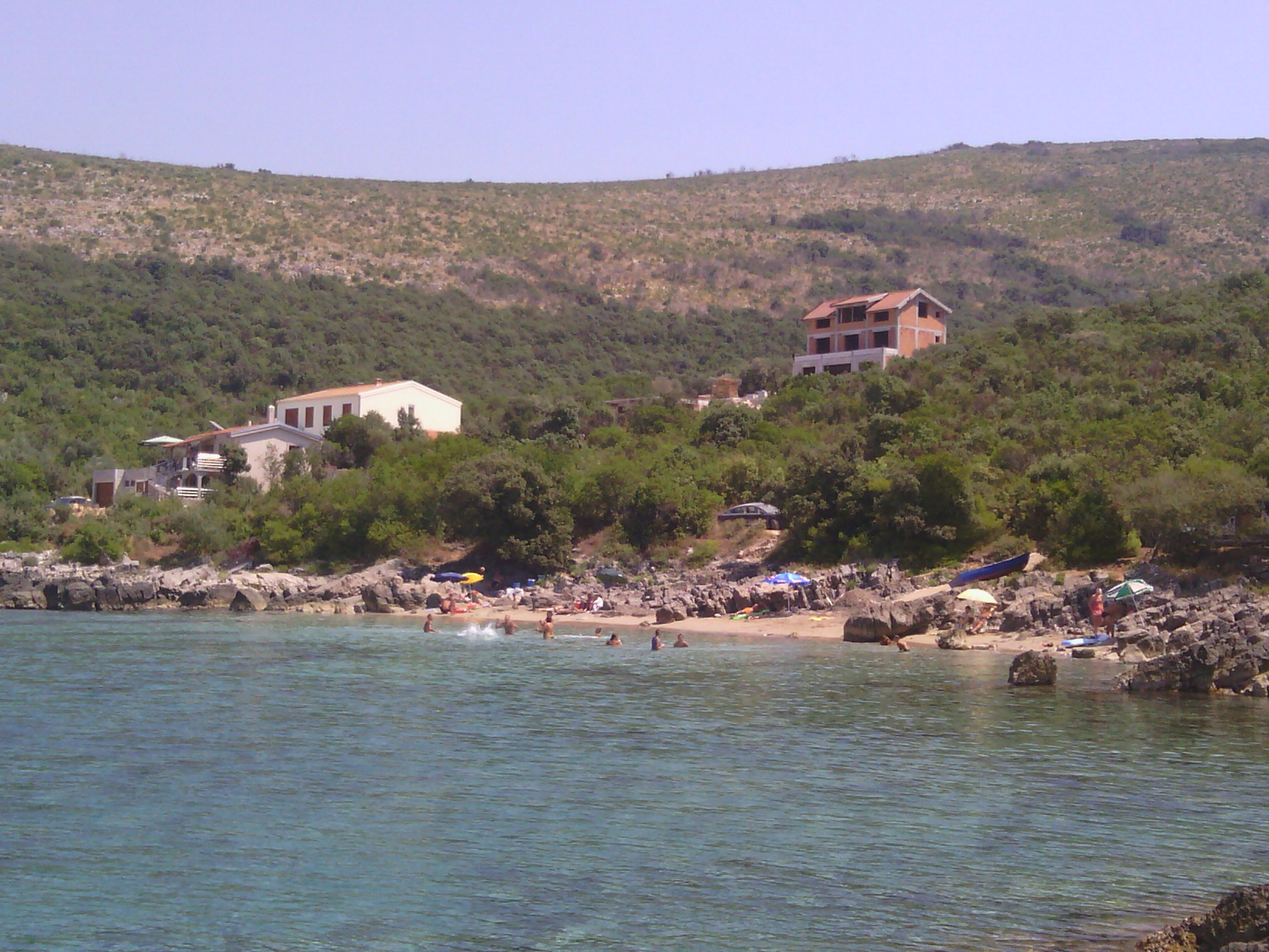 Plaža Žukovica